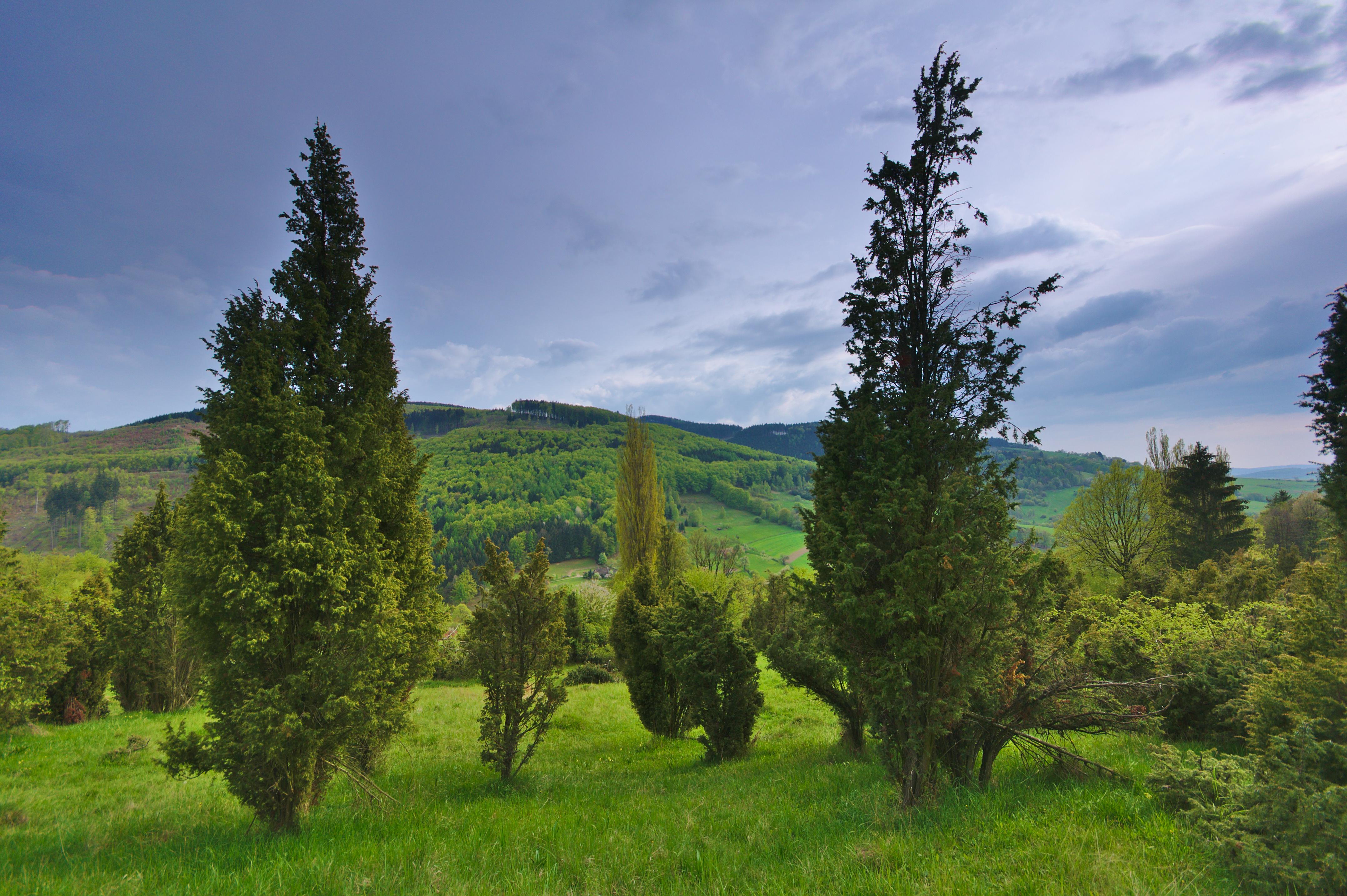 Přírodní rezervace Jalovcová stráň, okres Zlín